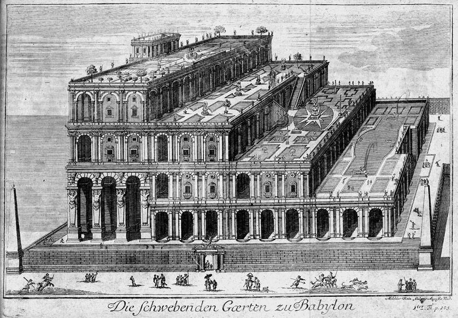 „Die schwebenden Gärten von Babylon“, in: Humphrey Prideaux: Alt- und Neues Testament In eine Connexion Mit der Jüden und benachbarten Völcker Historie gebracht, Andere Edition, Dresden, J. M. Lobeck, 1726.